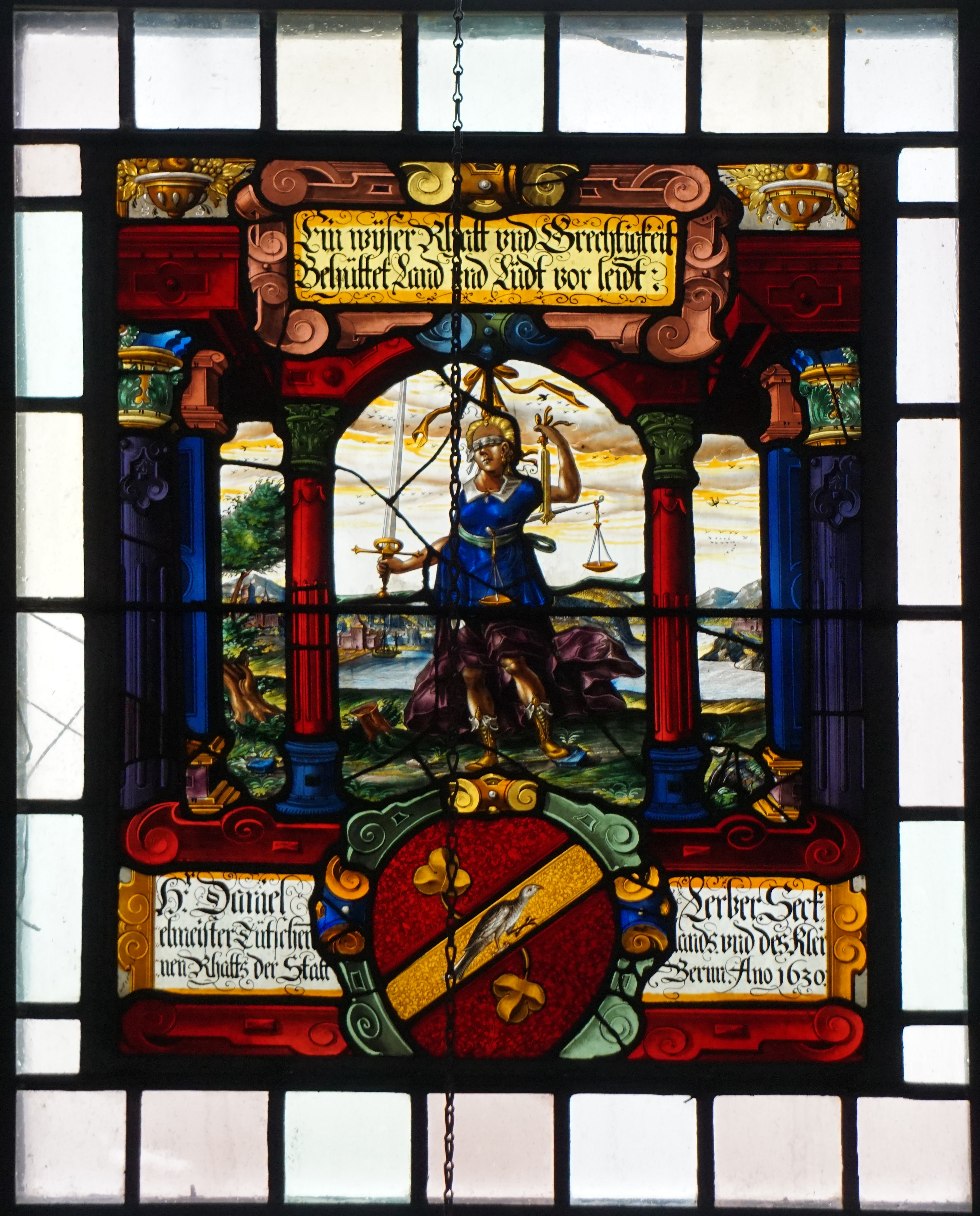 Stifterscheibe mit Justitia und Wappen von Daniel Lerber, 1630